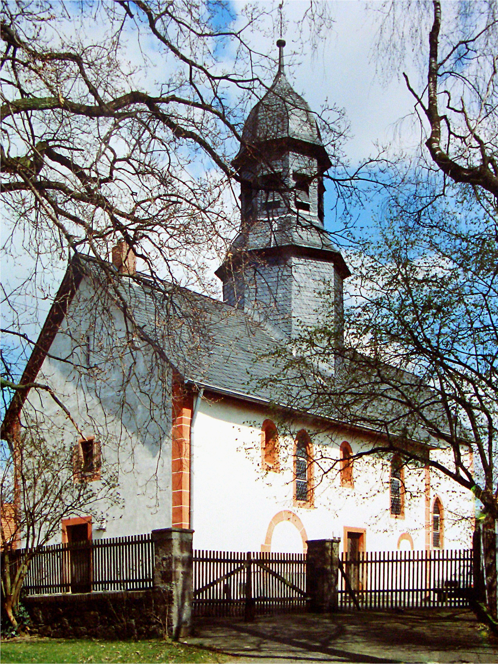 Evangelische Kirche Queckborn, Grünberg, Landkreis Gießen, Hessen, Deutschland